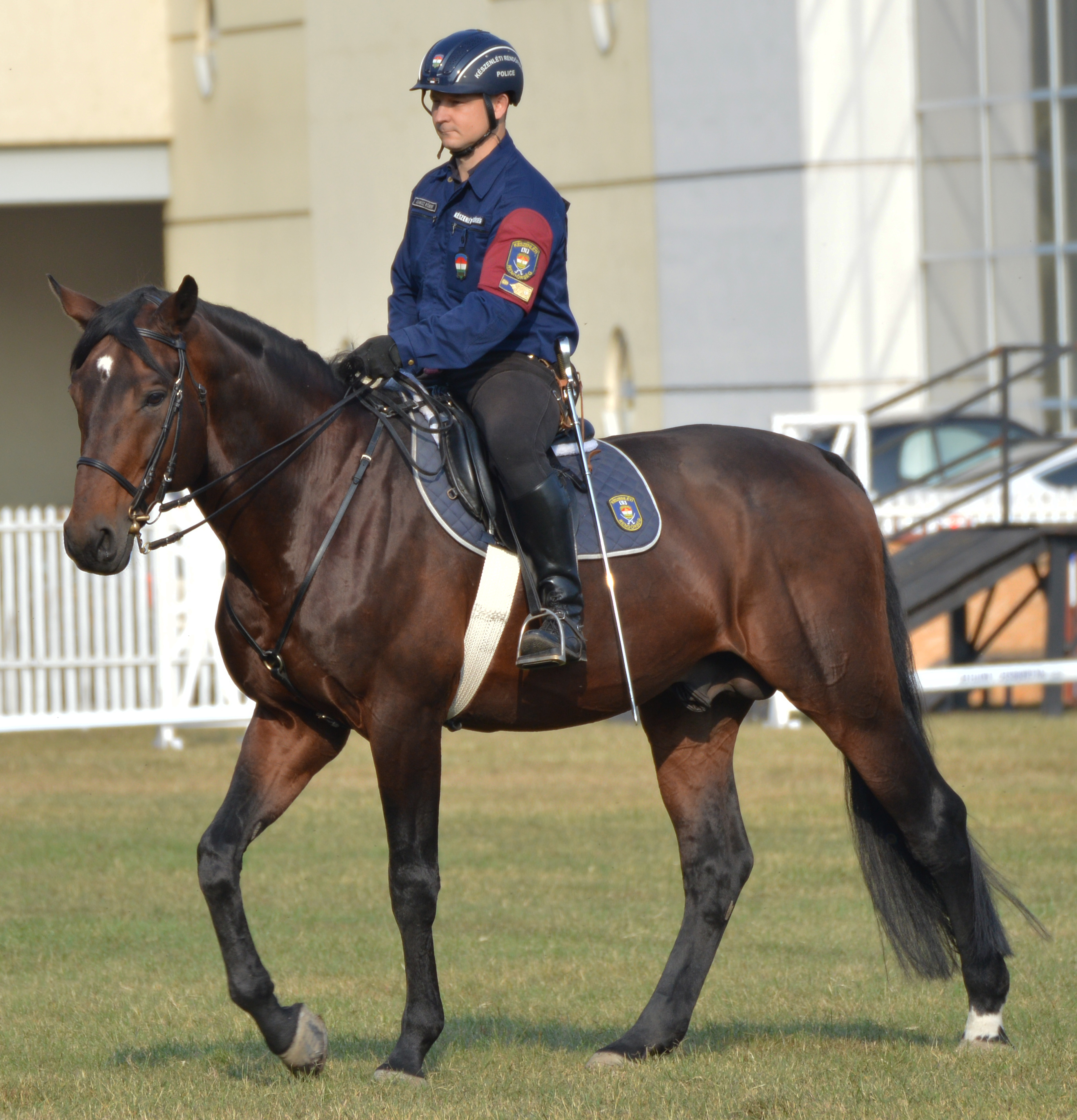 Járőrözés